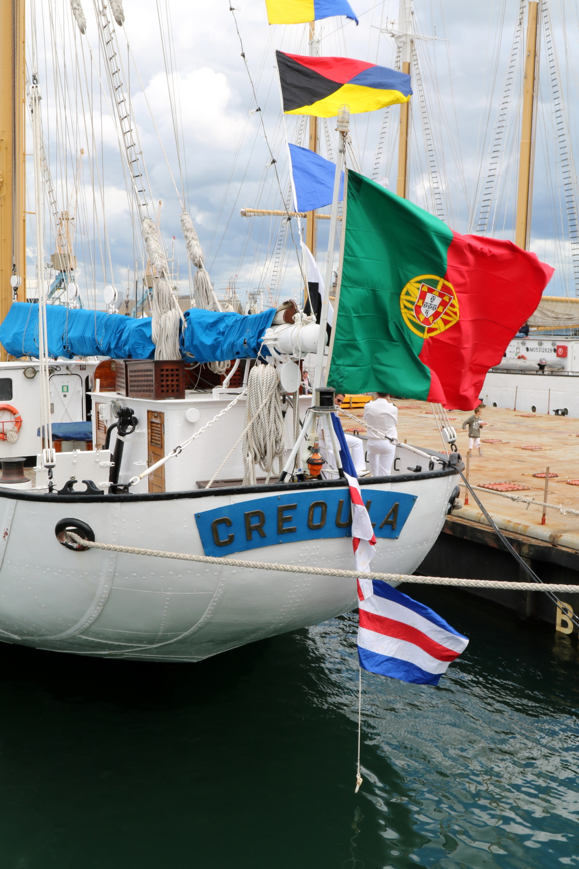 Creoula Brest 2016